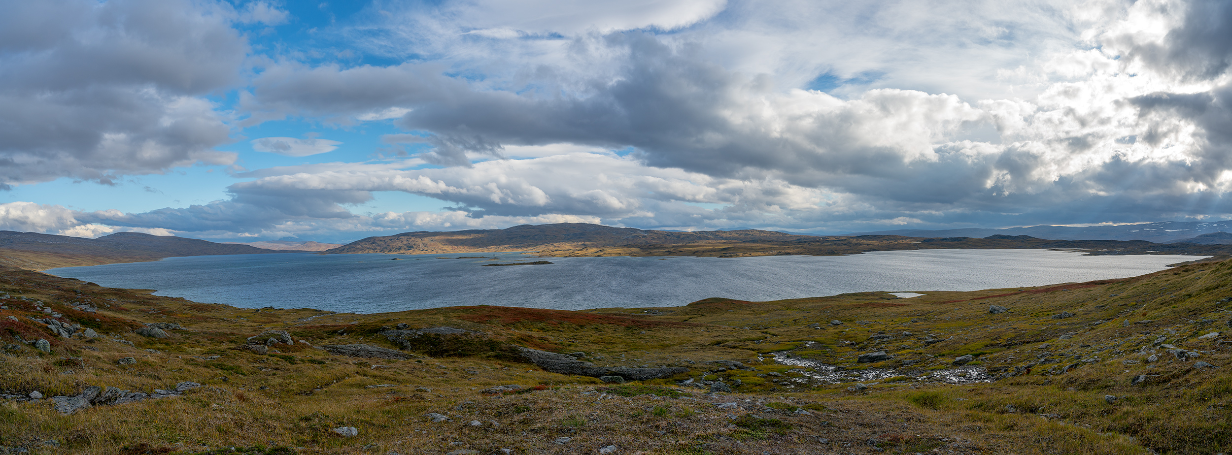 Slahpejávrre - vy från sluttningen sydväst om Ruonas.